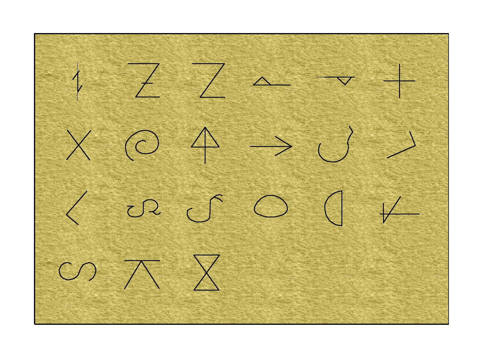 Monasterio de Santa María La Real, AGUILAR DE CAMPOO (Palencia), España, románica s XI. Catálogo de Marcas de cantería.